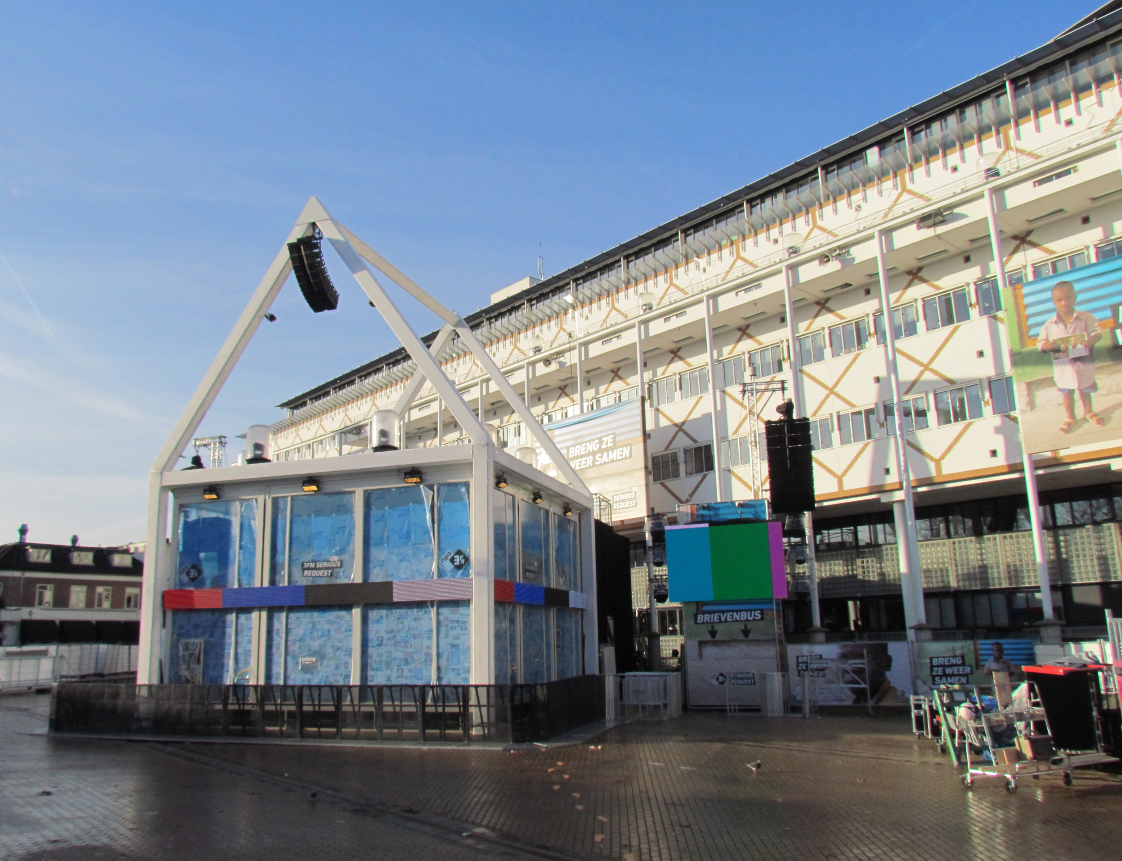 Glazen Huis van Serious Request 2017, stadhuisplein Apeldoorn